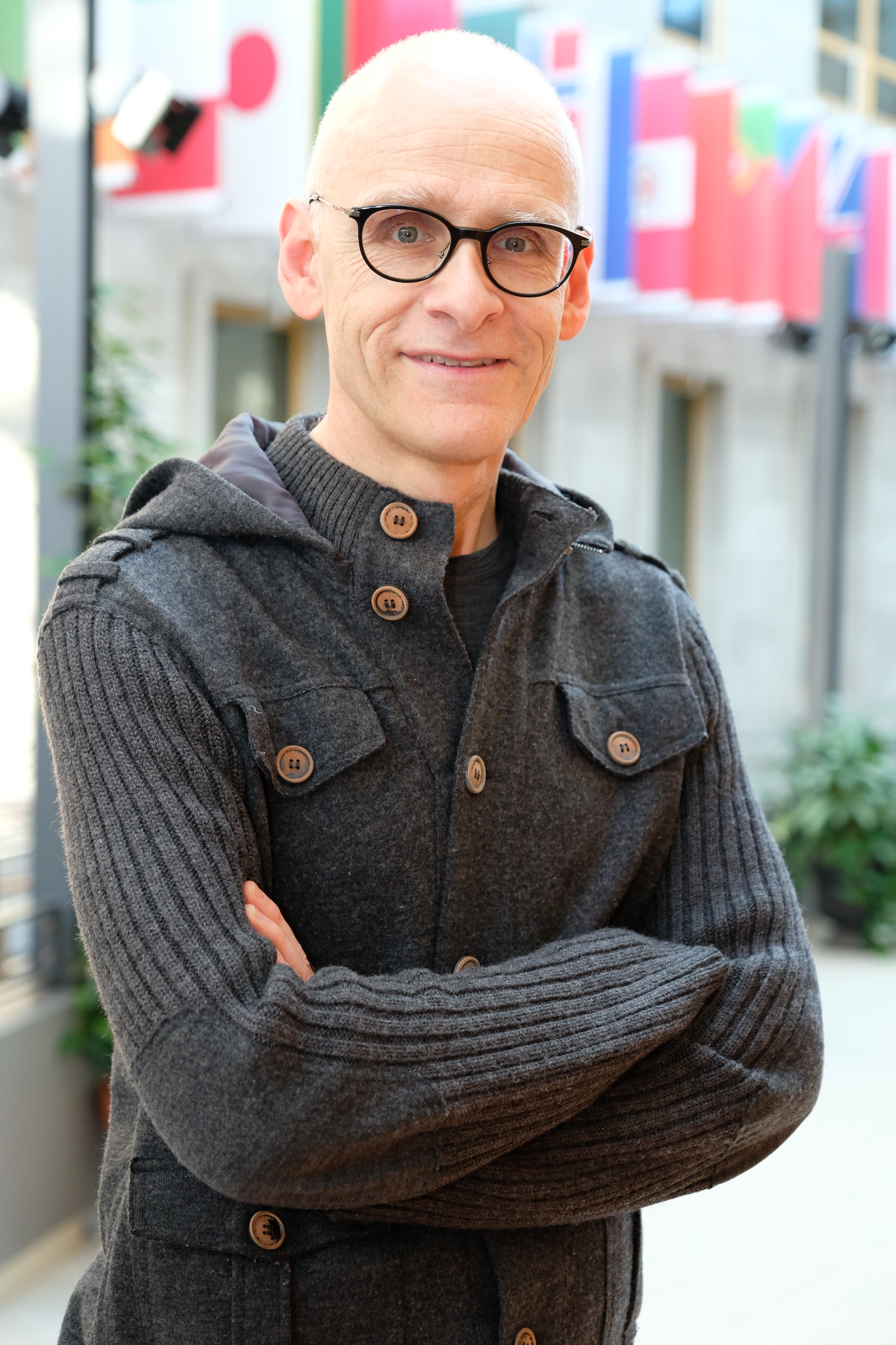 Photo d'Yves Gendron, professeur à FSA ULaval